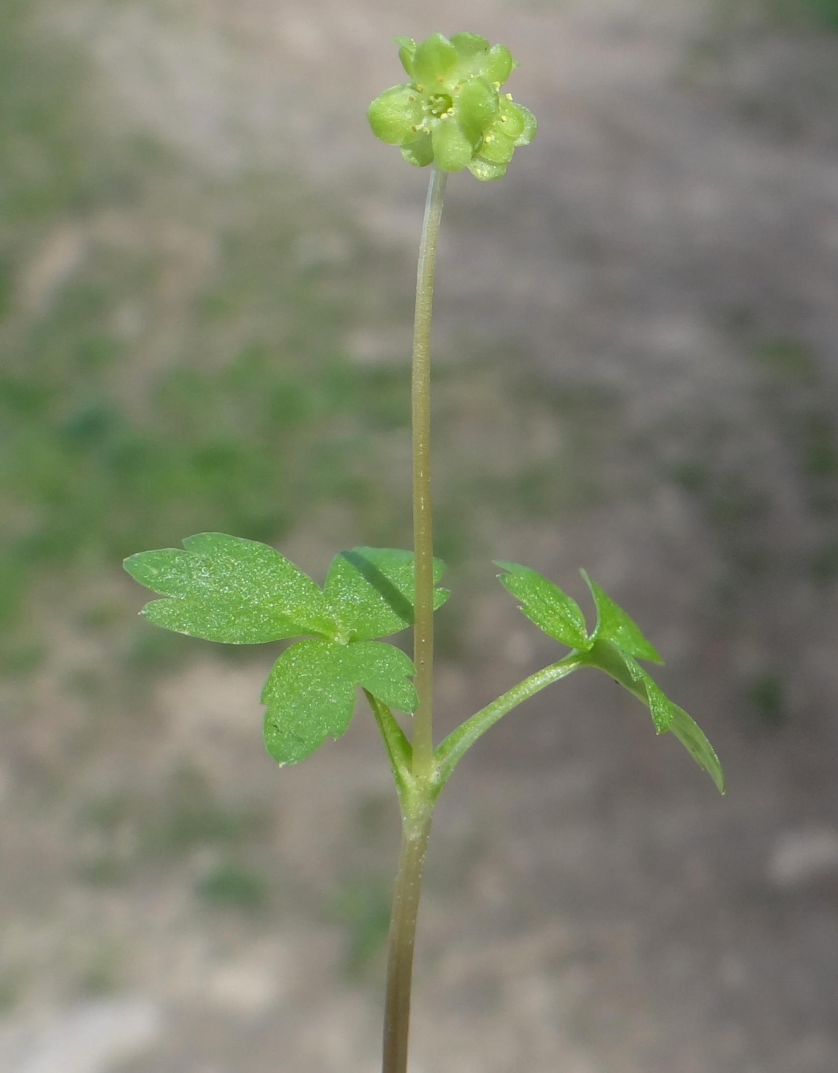 Adoxa moschatellina. Location: Poland, Kraków, Wzgórza Tynieckie